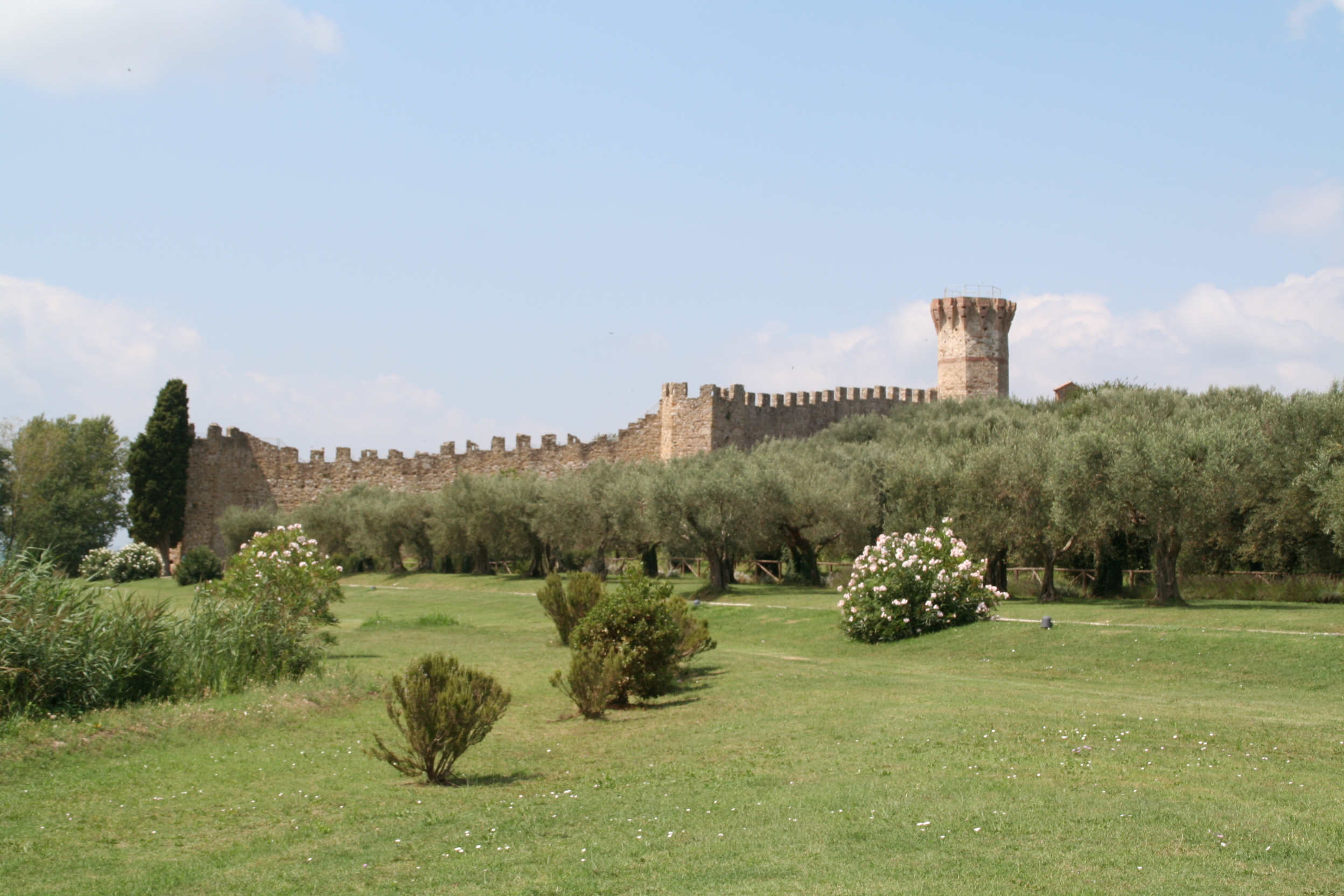 Isola Polvese Castello